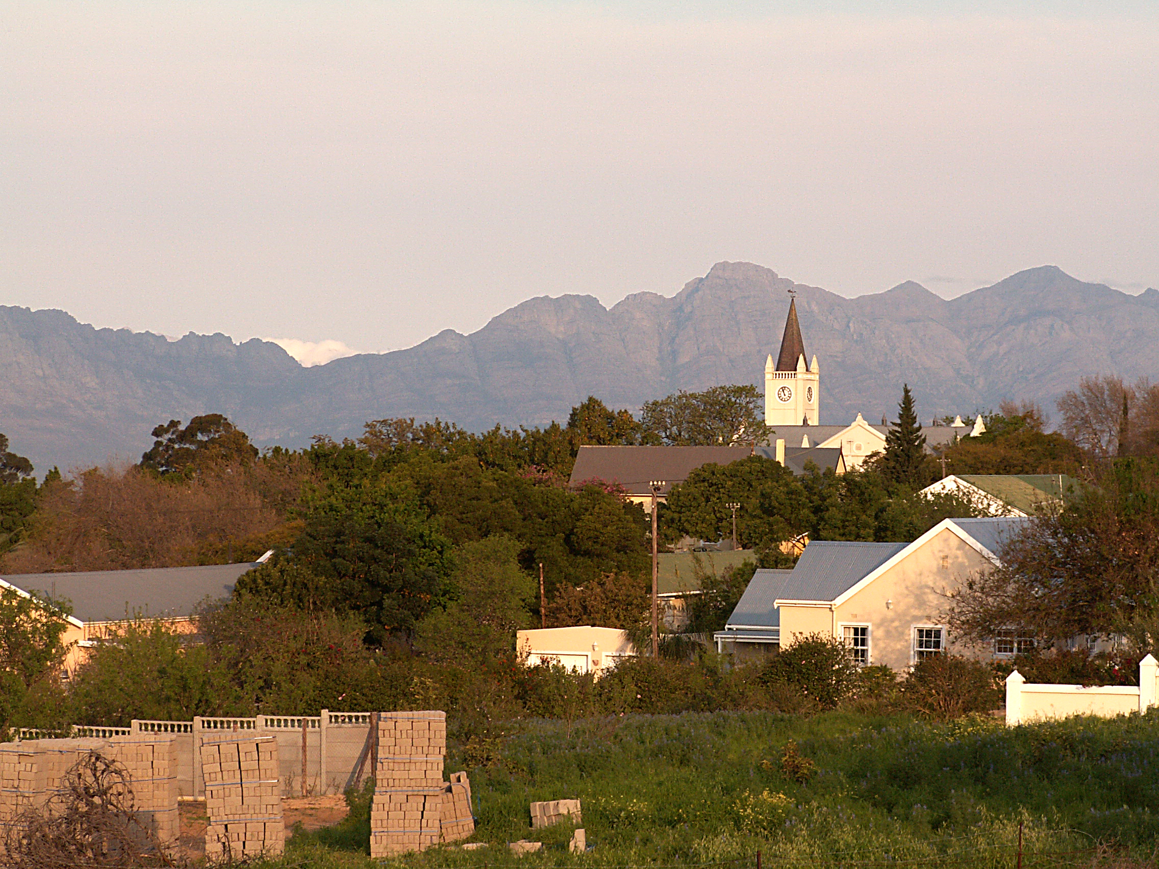 Riebeek Wes (Riebeek West), Gemeinde Swartland, Distrikt Westküste, Provinz Westkap in Südafrika